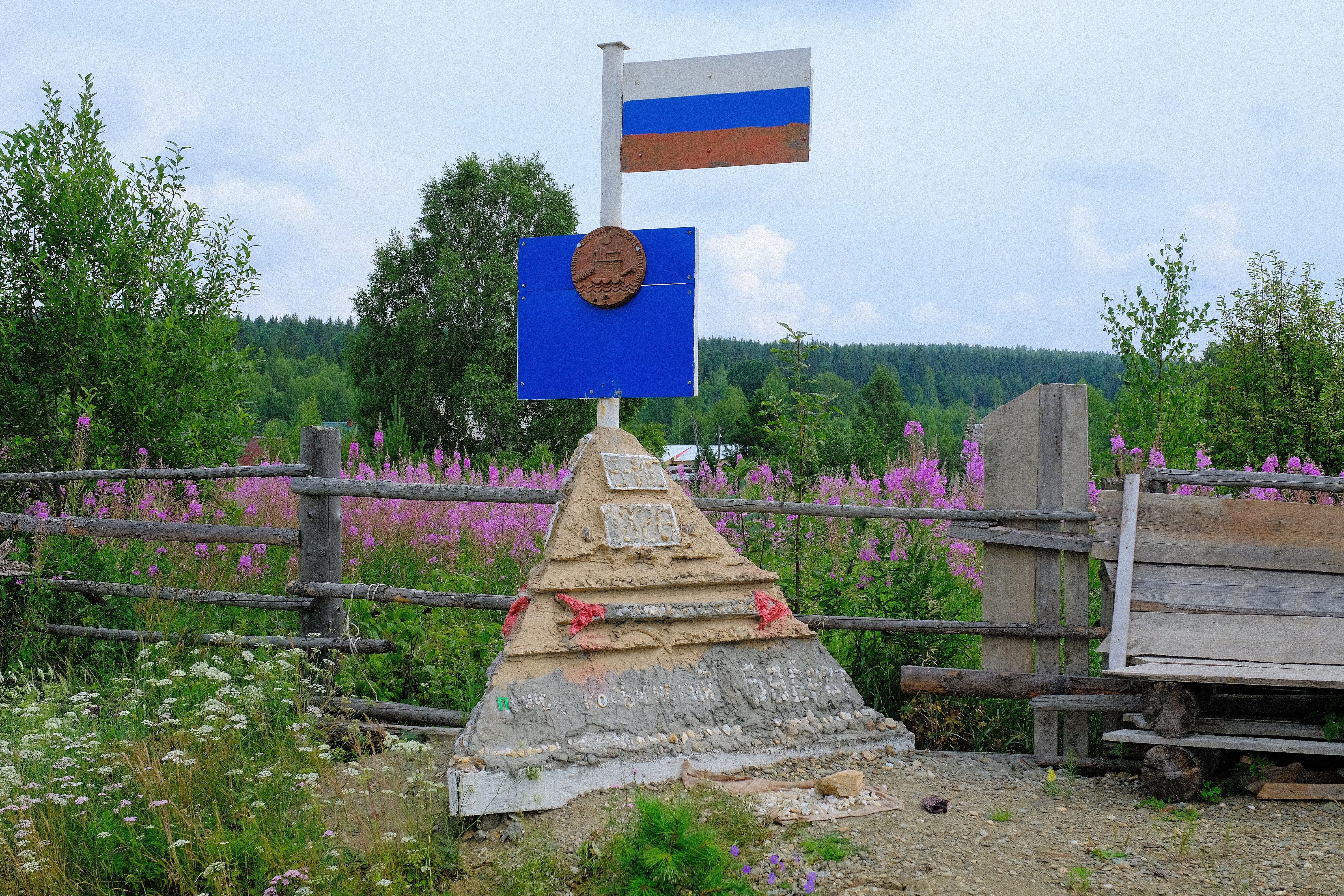 Импровизированный монумент в посёлке Верх-Ис